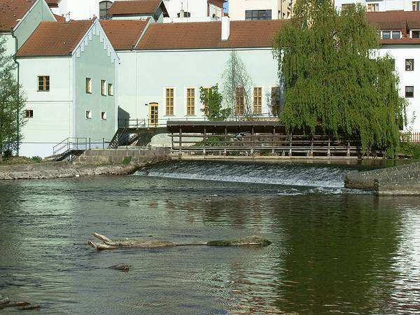 elektrárna písek